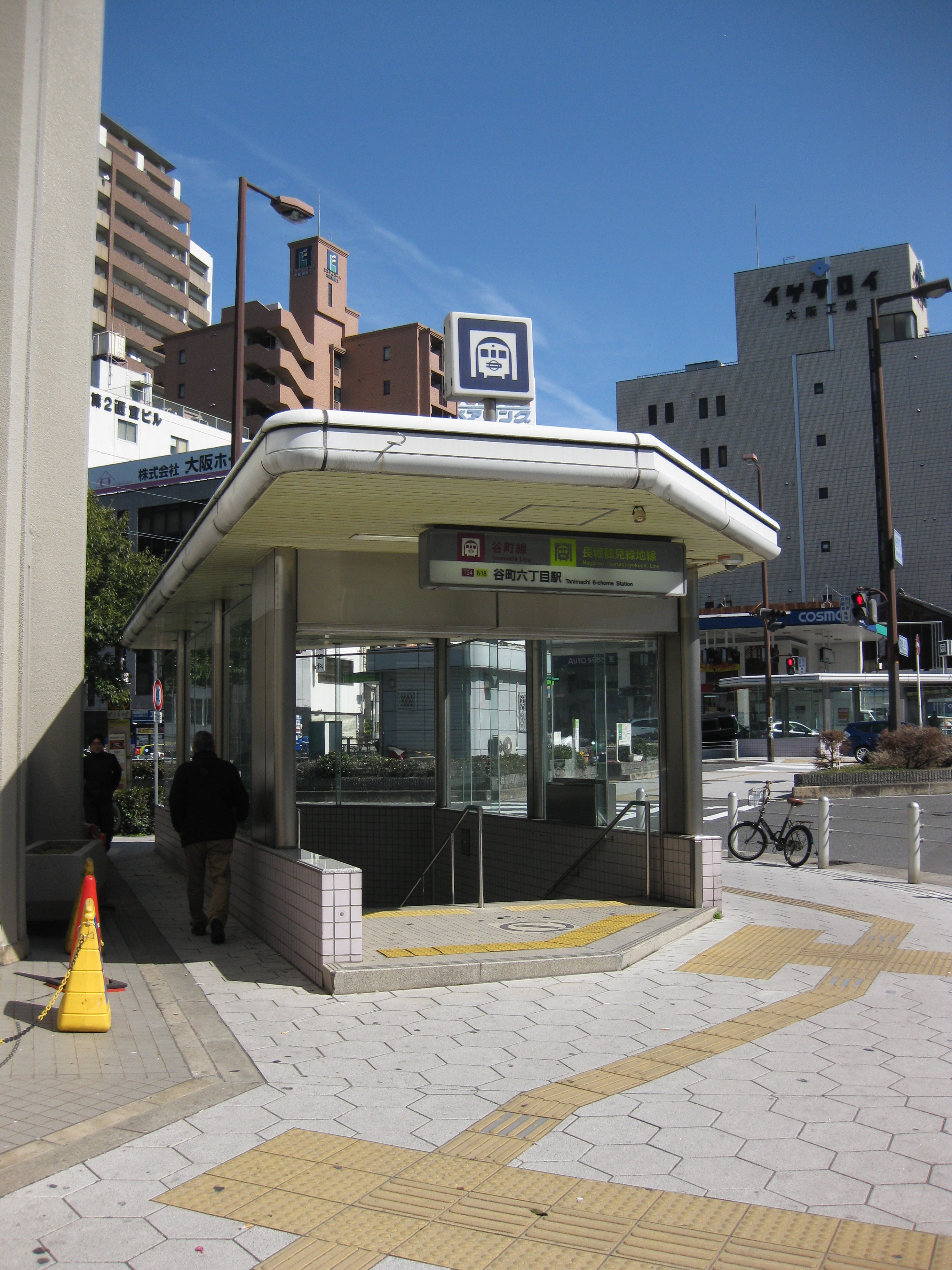 谷町六丁目駅5番出口